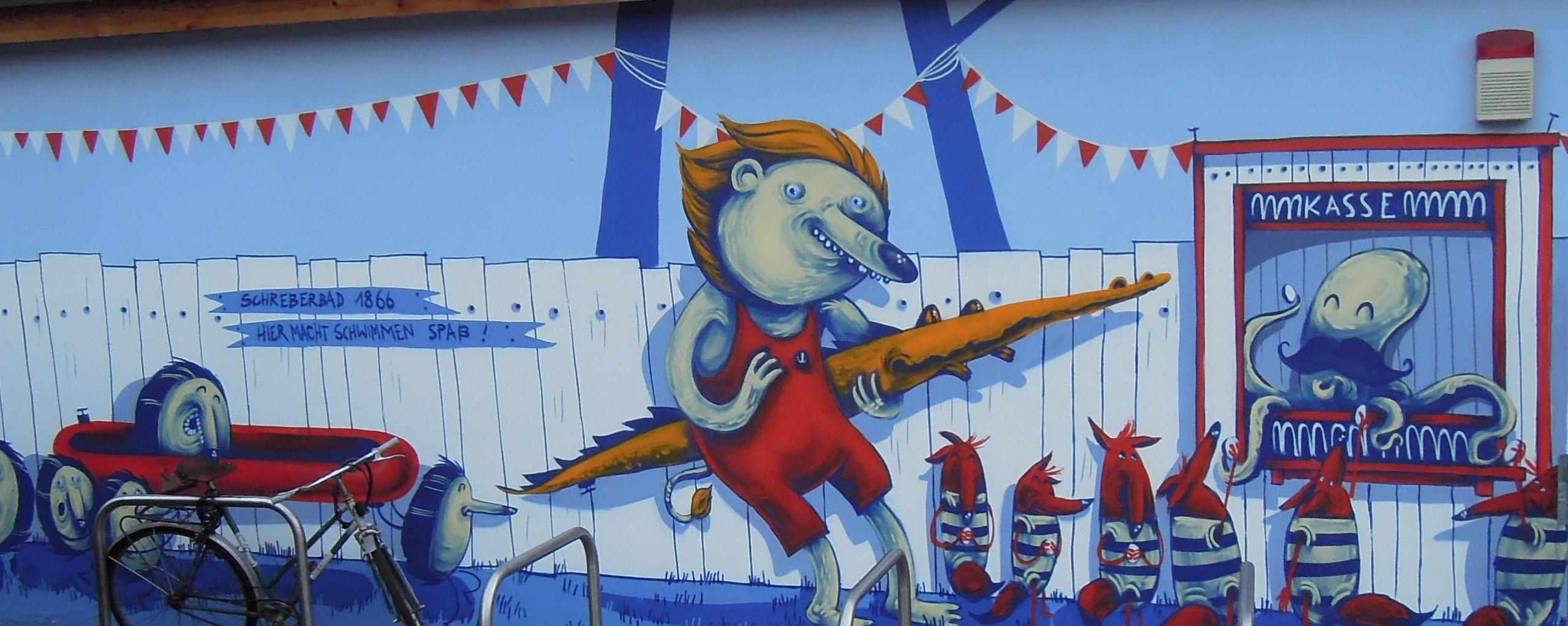 Graffiti am Schreberbad am Elstermühlgraben in Leipzig im August 2017 This file has been extracted from another file: Graffiti am Schreberbad neben dem Elstermühlgraben in Leipzig im August 2017.jpg